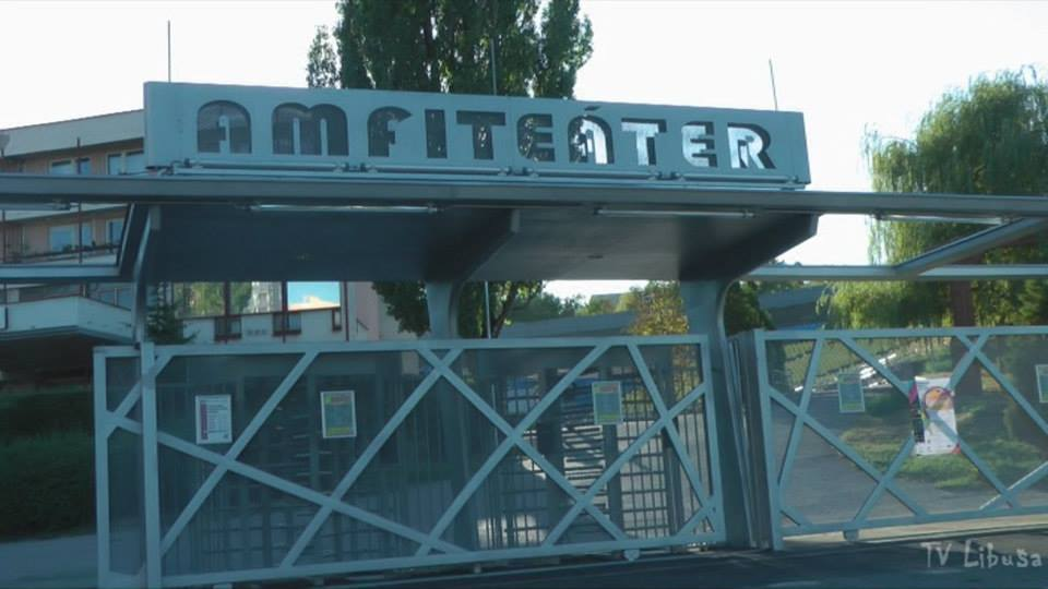 Vchod do amfiteátra - vstupná brána